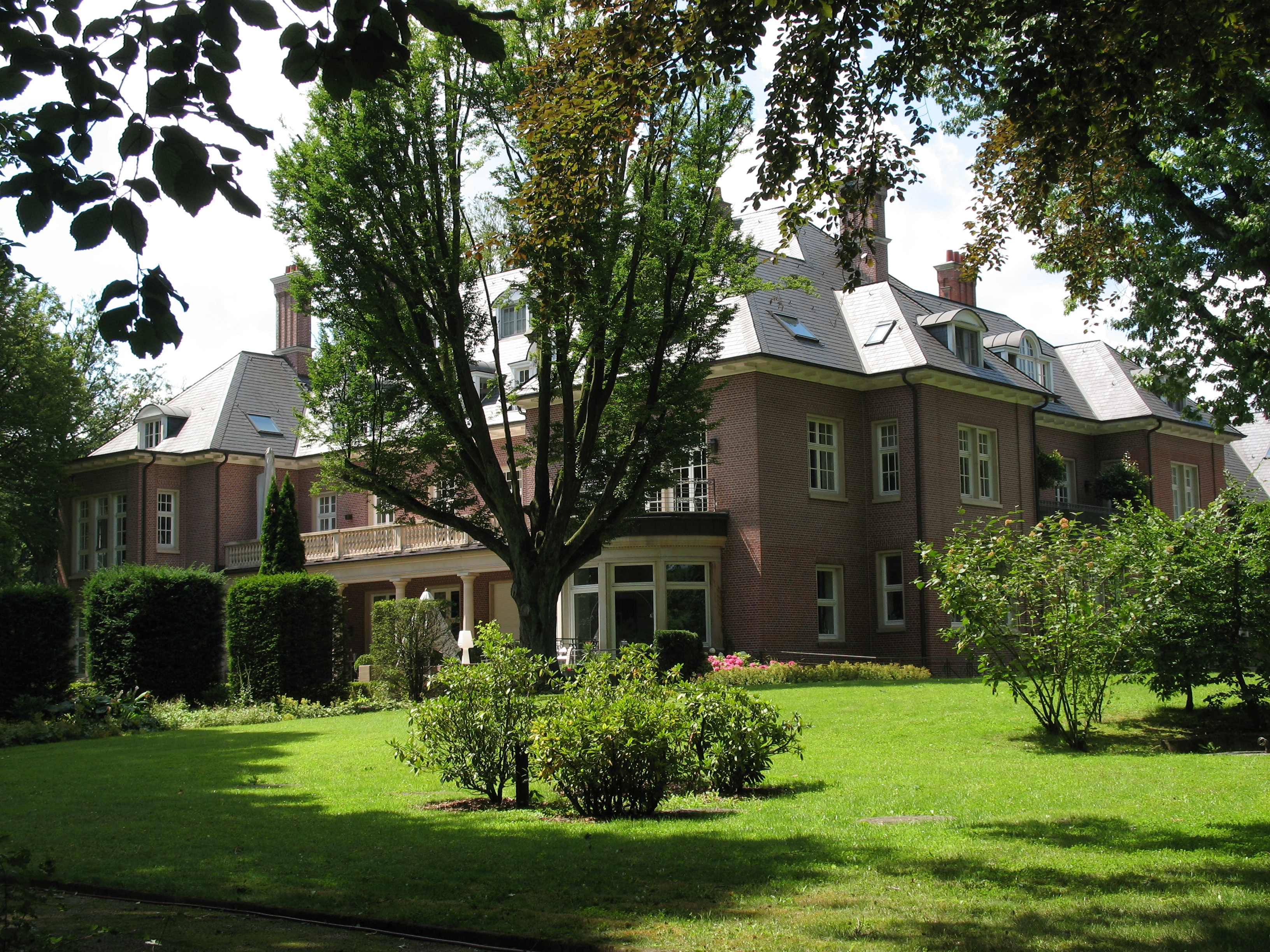 Villa Fritz Thyssen von der Großenbaumer Straße aus gesehen; Villa Fritz Thyssen seen from Großenbaumer Straße